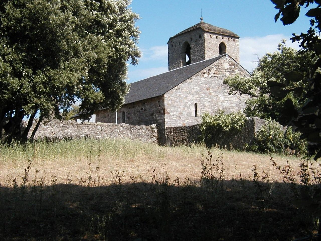 Saint-Julien (Hérault) - Vue générale du prieuré.